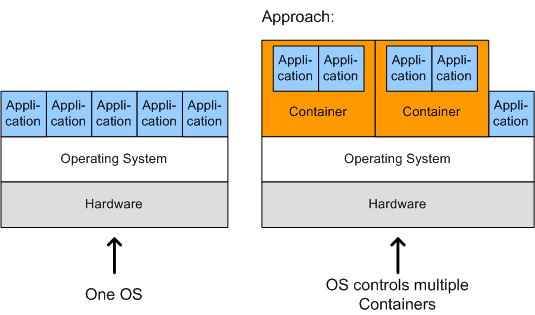 Ansatz der Betriebssystemvirtualisierung zur Schaffung virtueller Betriebsumgebungen